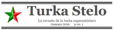 Turka Stelo banner